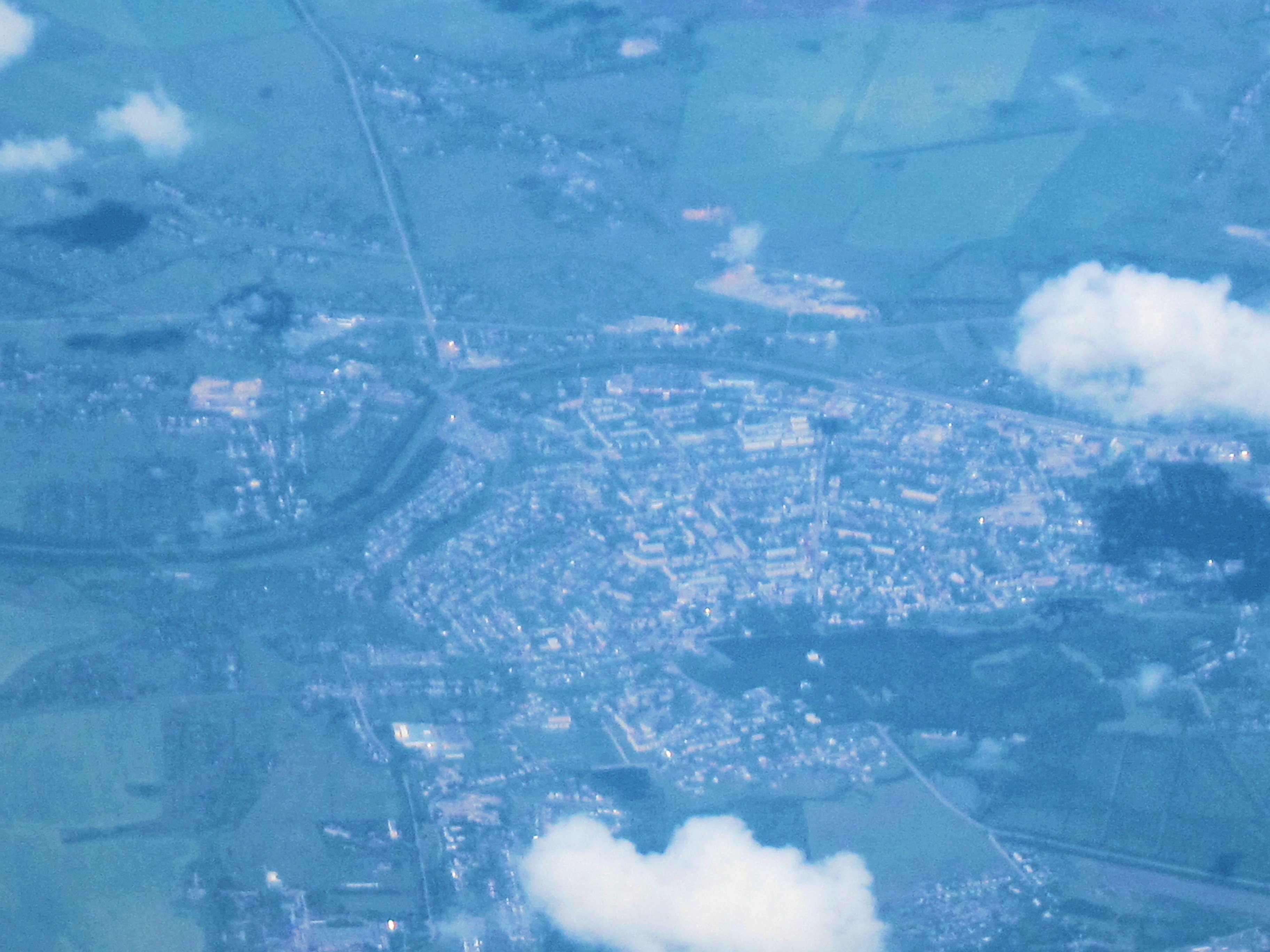 Город Богородицк Тульской области. Сверху - запад. Туда (вверх и чуть влево) уходит дорога, соединяющая город с шоссе М4 Рейс Санкт-Петербург - Сочи (09:30 - 12:14) авиакомпании "Россия".